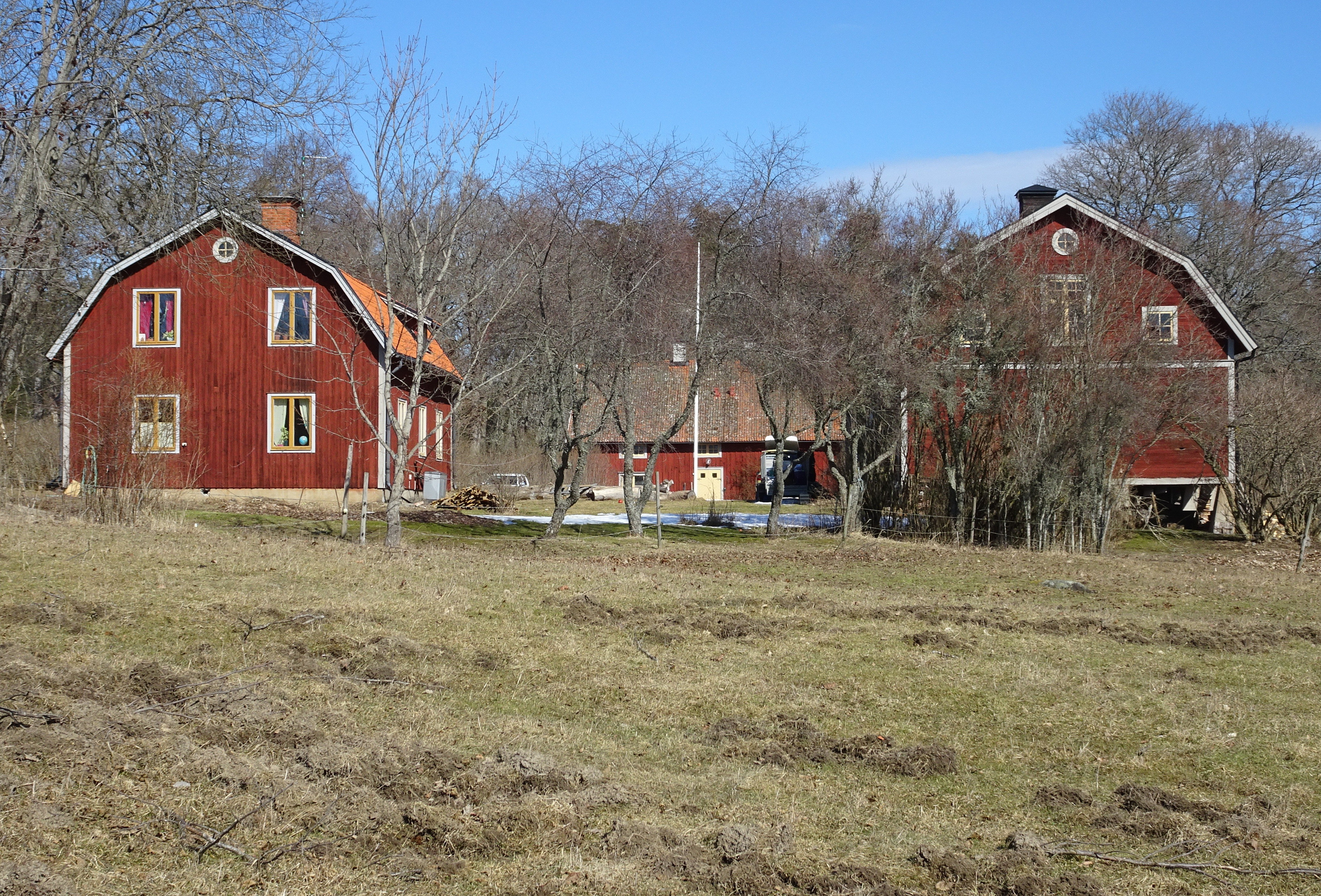 Bjursnäs, Björnlunda, huvudbyggnad och flyglar